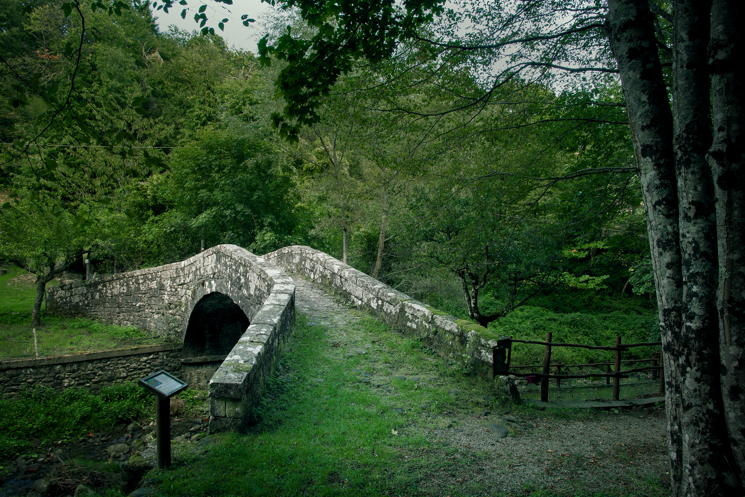 Ponte romanico a Serravalle This is a photo of a monument which is part of cultural heritage of Italy.